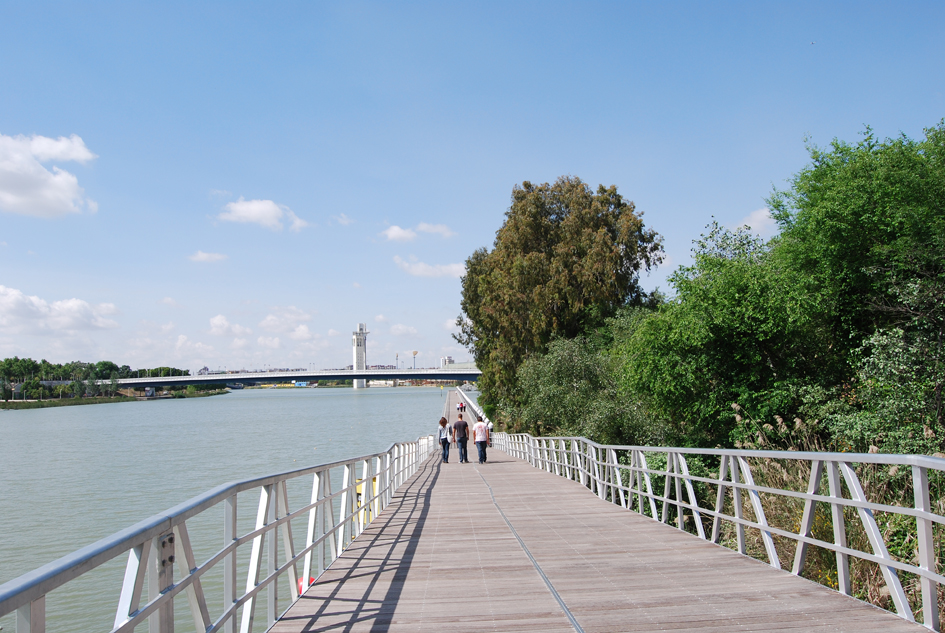 Pasarela sobre el río Guadalquivir a su paso por el Jardín Americano de Sevilla